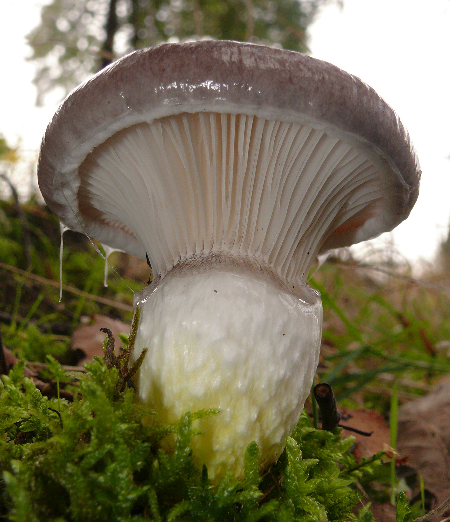 Gomphidius glutinosus, Schwäbisch-Fränkische Waldberge, Germany